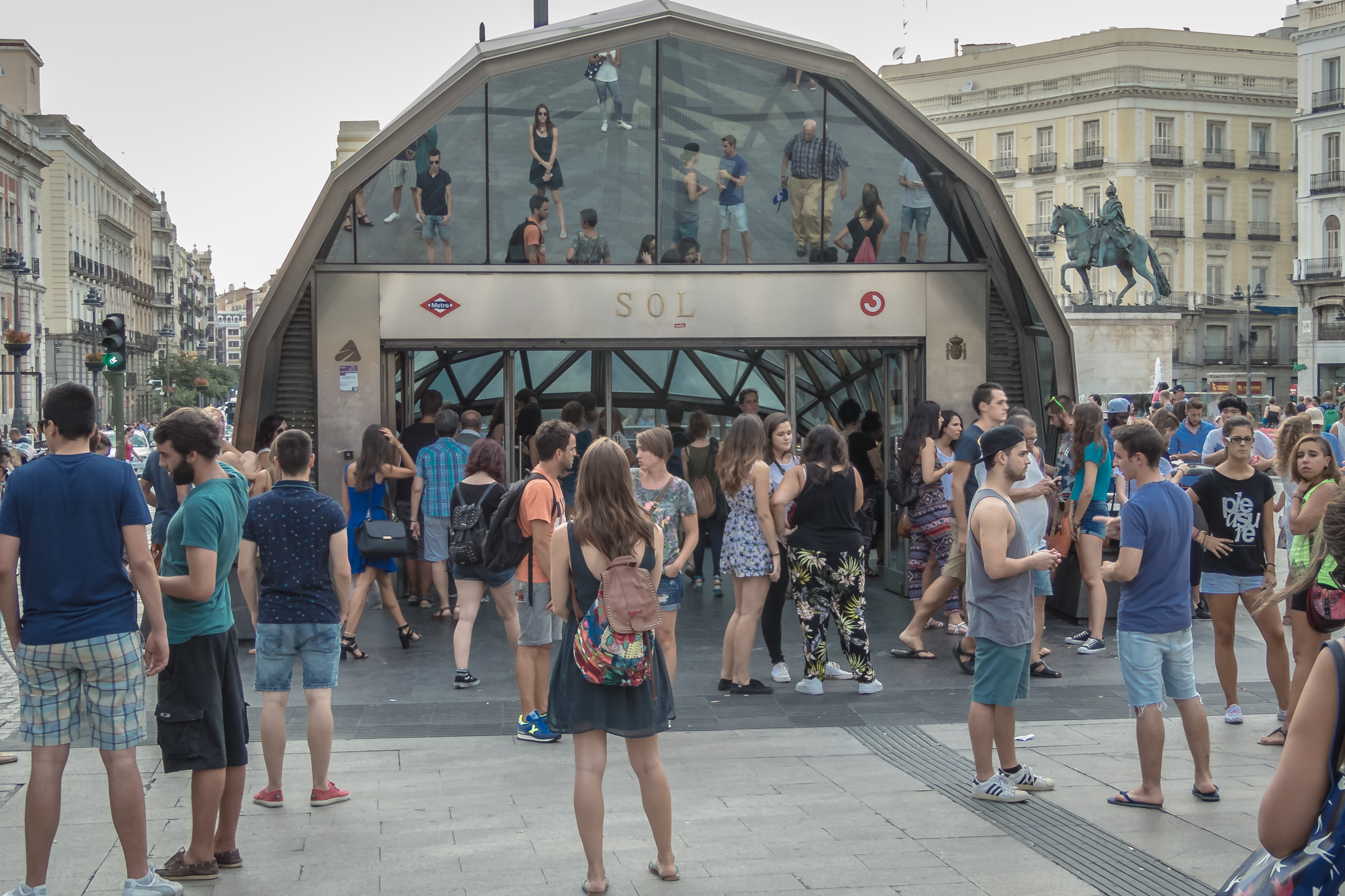 Sol